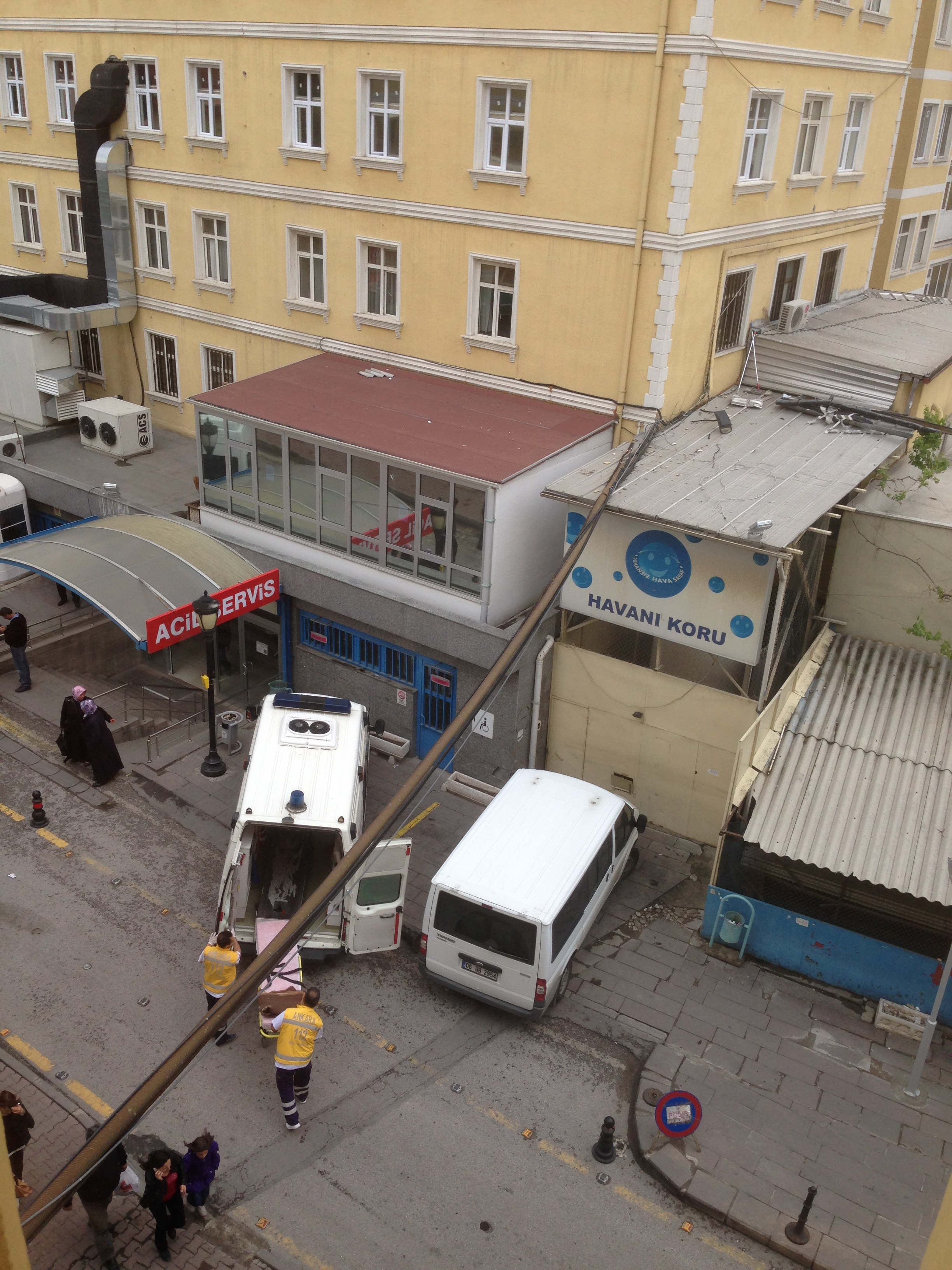 Acil servis önü